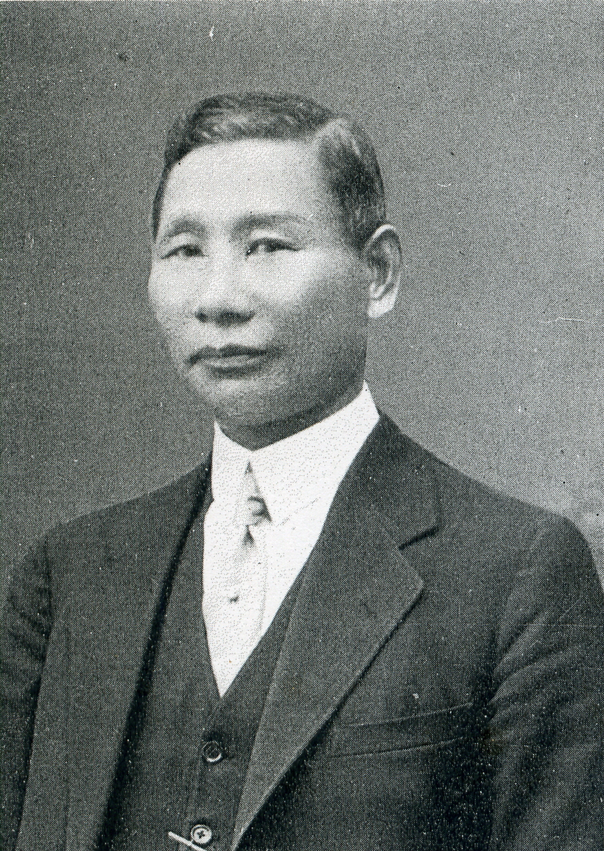 この写真は、中村嘉寿（1880-1965）の写真です。